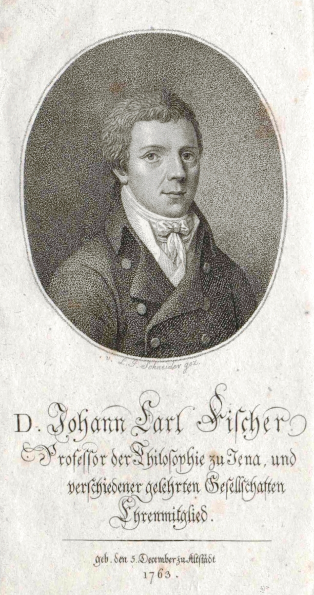 Johann Karl Fischer (1763–1833)